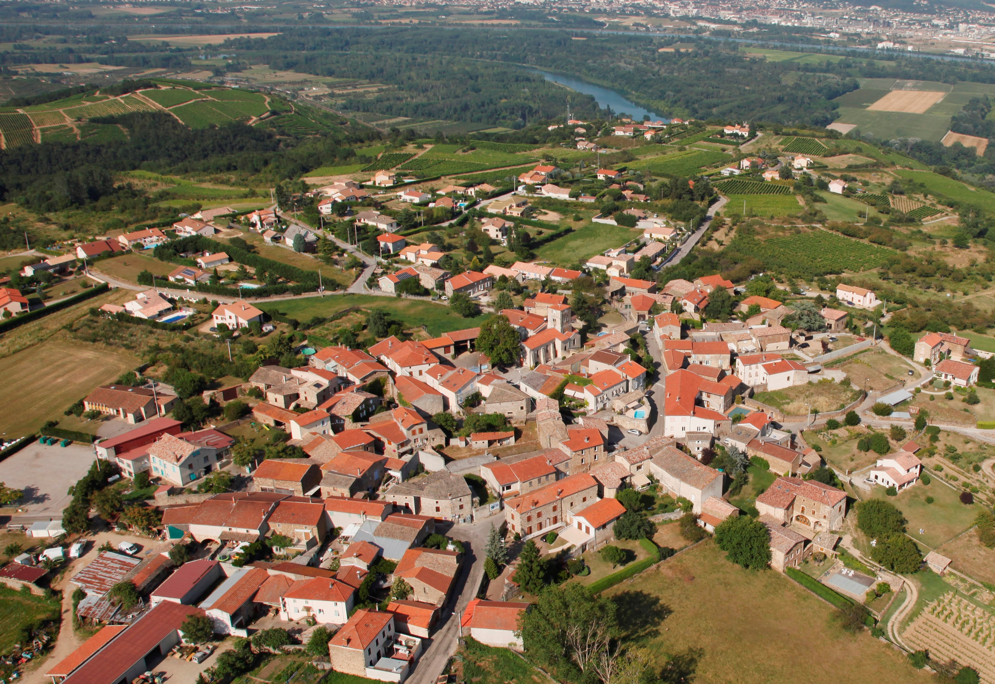 Charnas détail